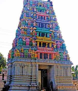 Navaladi-karuppanna-swamy-temple